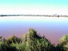 San Pedro visto desde las salinas. El color rojizo del agua es producido por unas bacterias que viven en ambientes muy salados.